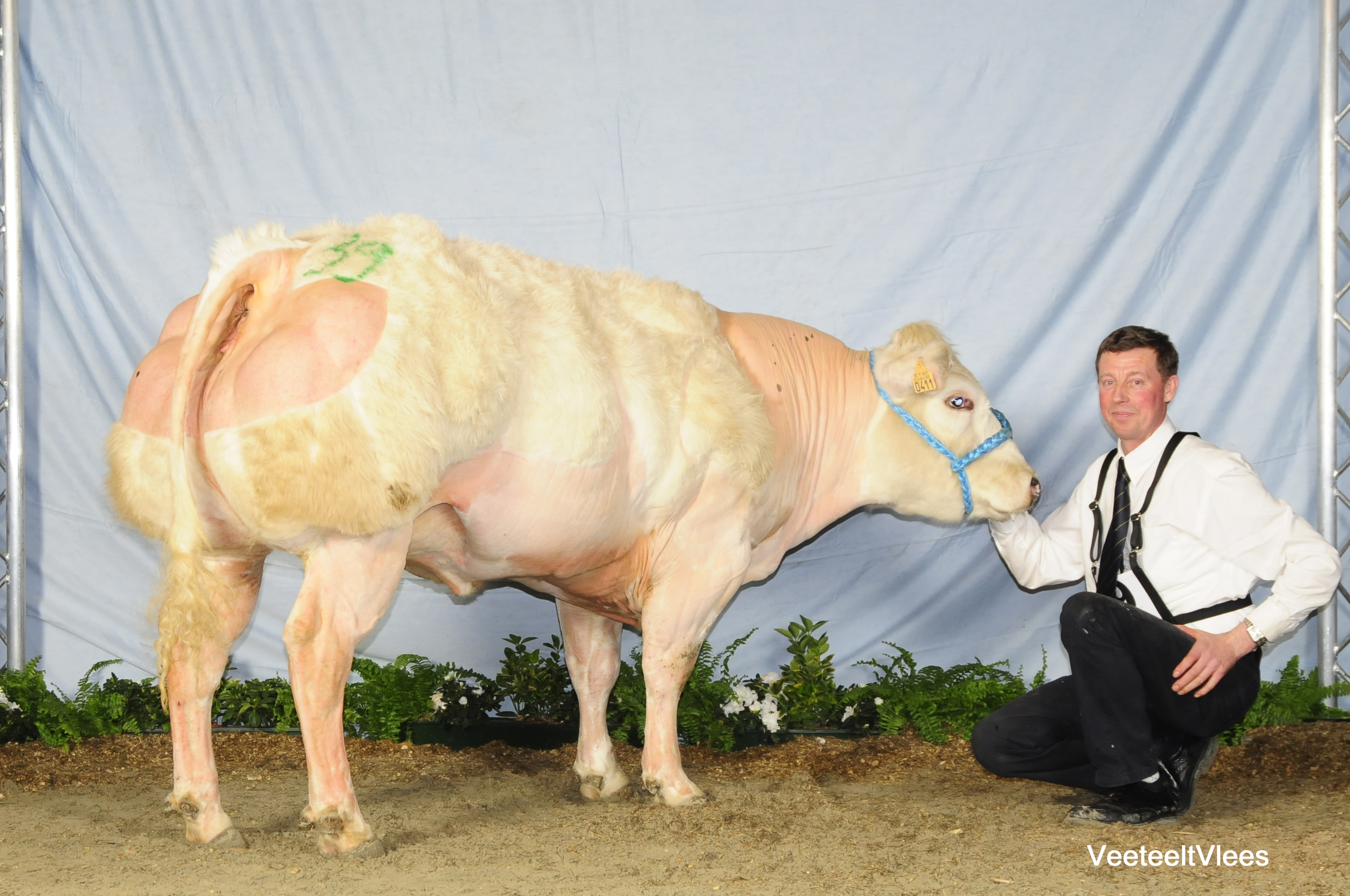 Vleesvee prijskamp - Agriflanders 2009